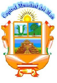 Escudo del Distrito de Huayllabamba (Cusco)